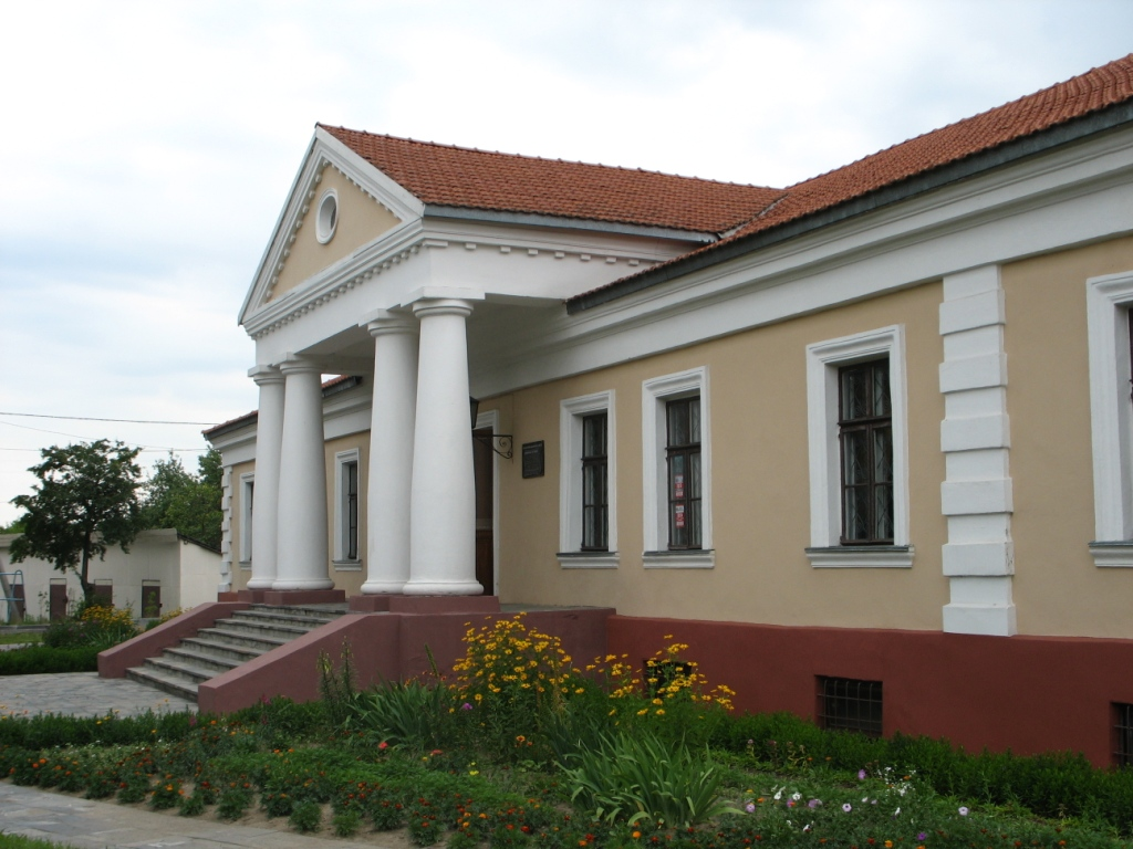 museum (Slutsk, Belarus)